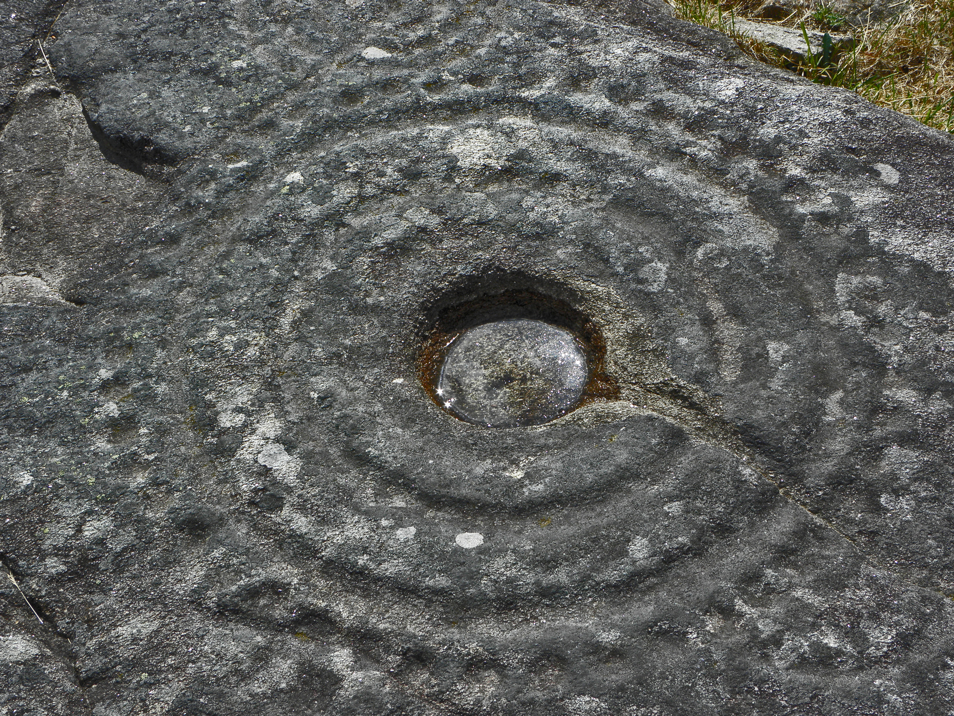 Laxe das Rodas (Louro, Muros, Galiza)